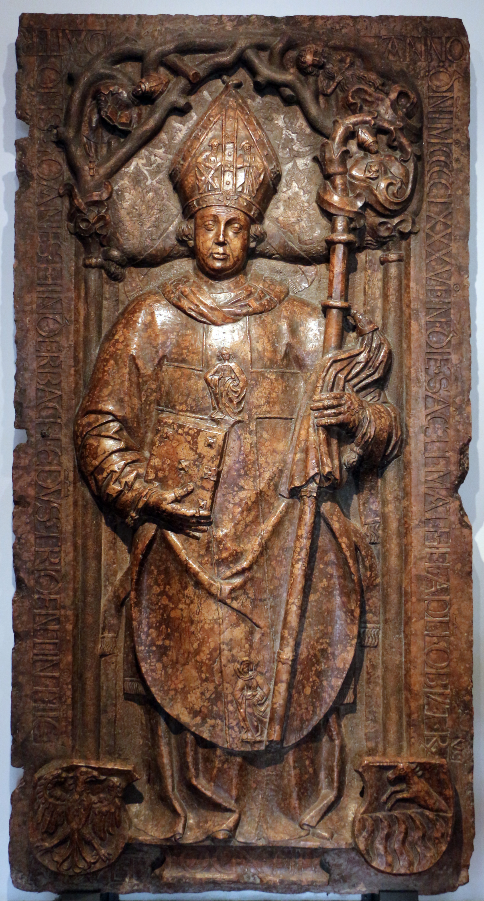 Palazzo Pretorio (Museo Diocesano Tridentino) This is a photo of a monument which is part of cultural heritage of Italy.